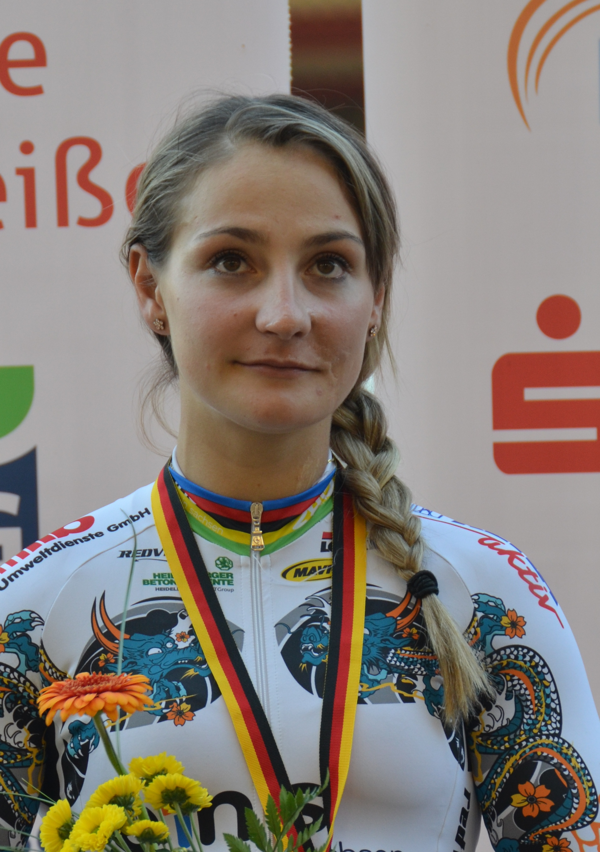 Kristina Vogel, deutsche Radsportlerin